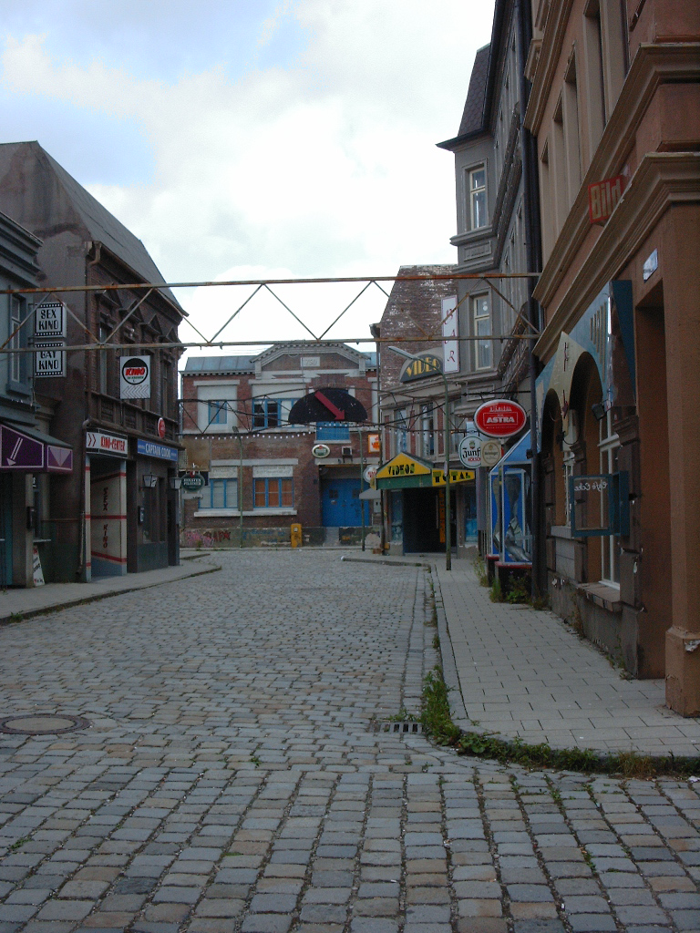 Bavaria Filmstudios